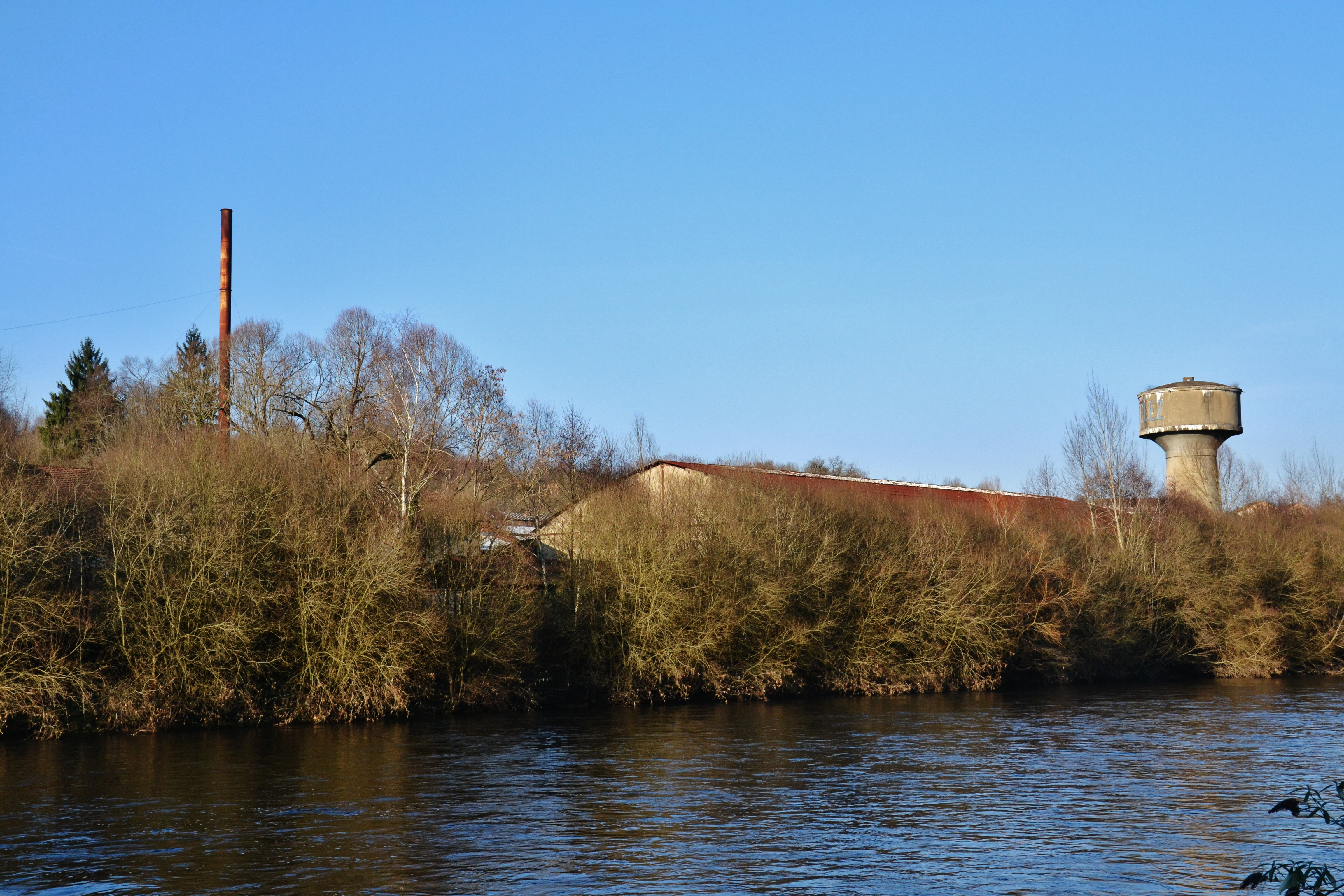 Cheminée, bâtiments et château d'eau de l'ancienne usine de caoutchouc Wattelez, au Palais-sur-Vienne (Haute-Vienne, France).